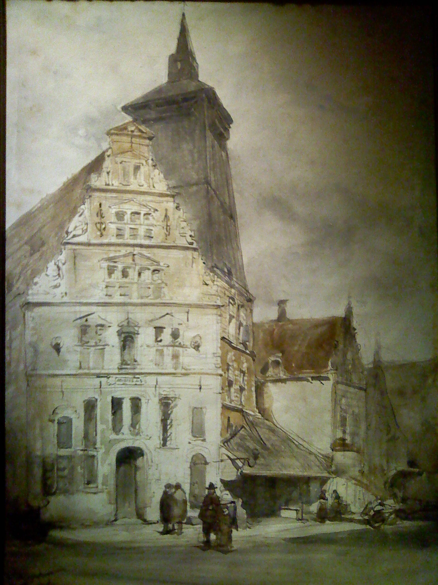 schilderij door Johannes Bosboom, tonende het Sint Jans Gasthuis (nu Boterhal) en de vrijstaande klokkentoren van de voormalige Grote Kerk. toren gesloopt in tweede helft van de 19e eeuw.